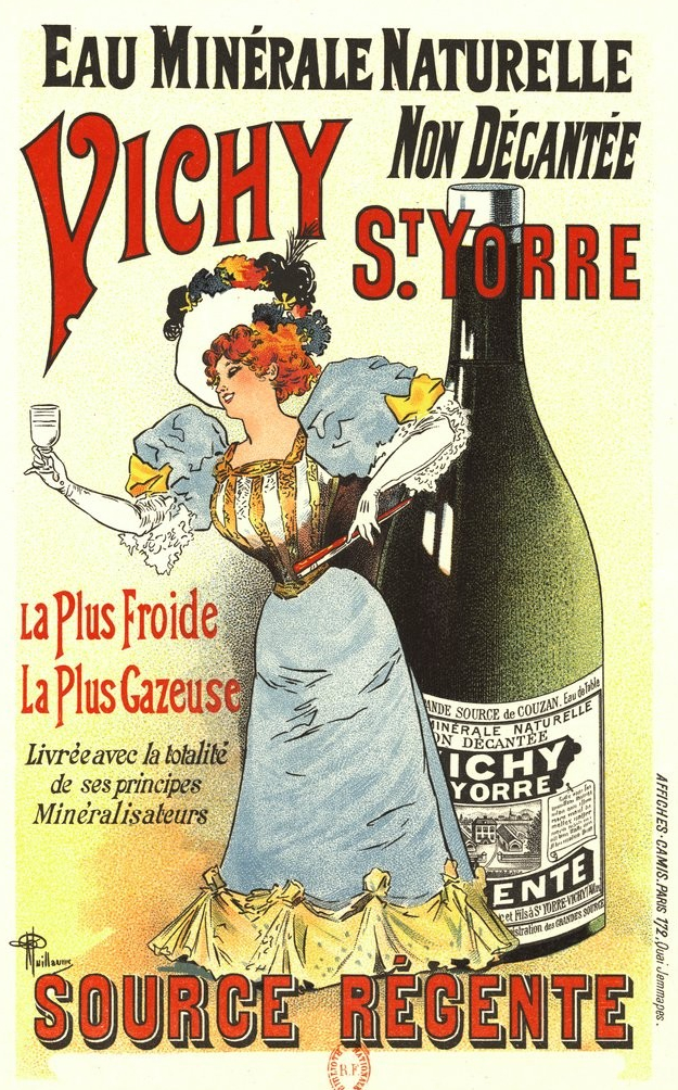 Lithographic poster for 'Eau minérale naturelle Vichy Saint-Yorre, Source Régente', by Albert Guillaume, printed by Camis, Paris.